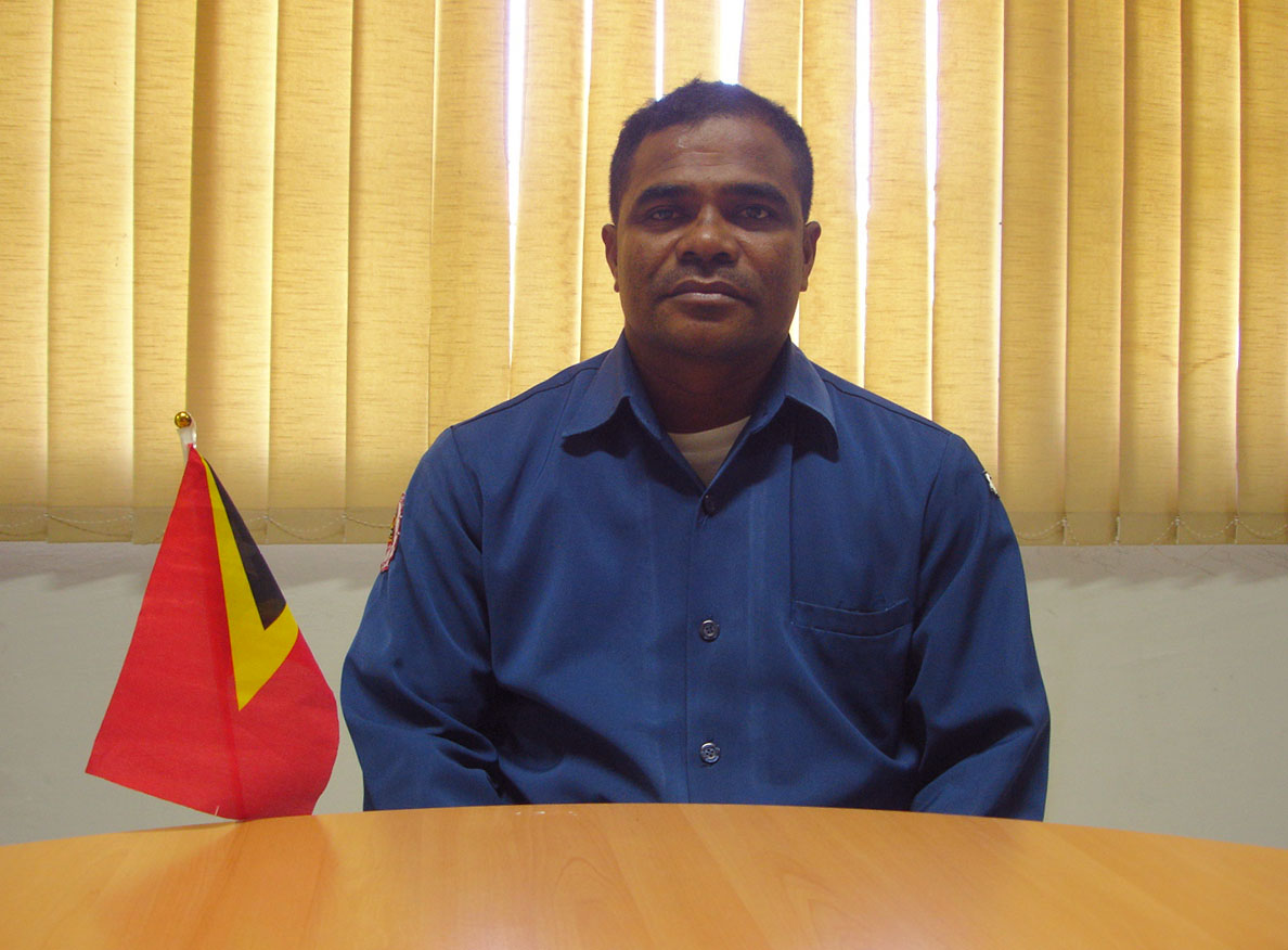 Manuel Gusmão, Administrator des Subdistrikts Vera Cruz